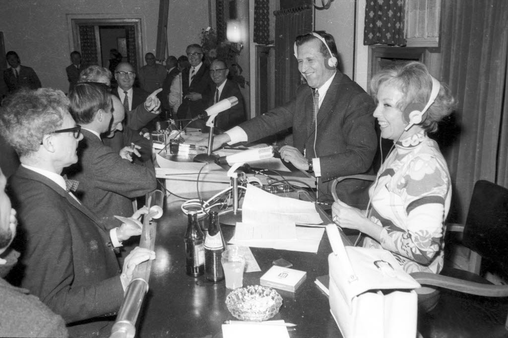 Rechts am umlagerten Präsidiumstisch Oberbürgermeister Günther Bantzer, der gerade die dritte richtige Antwort an Quizmaster Hans Rosenthal in Stuttgart übermittelt hat, womit Kiels Sieg sicher ist. Rechts Rundfunkreporterin Lilo Katzke.